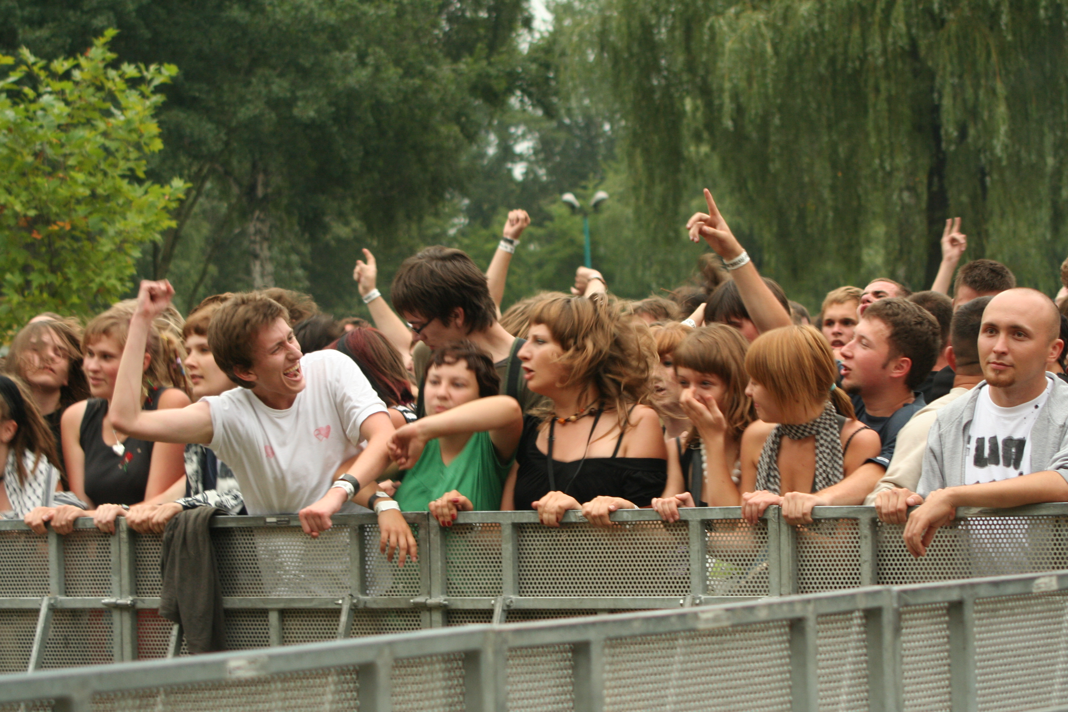 Off Festival, Mysłowice - pubiczność podczas koncertu Dezertera